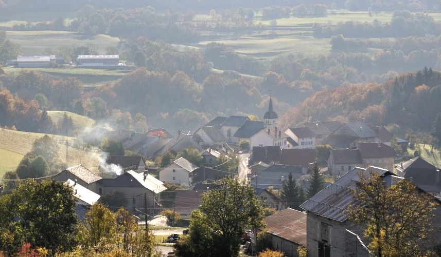 village du Petit-Abergement, Valromey, 01260, dans l' Ain